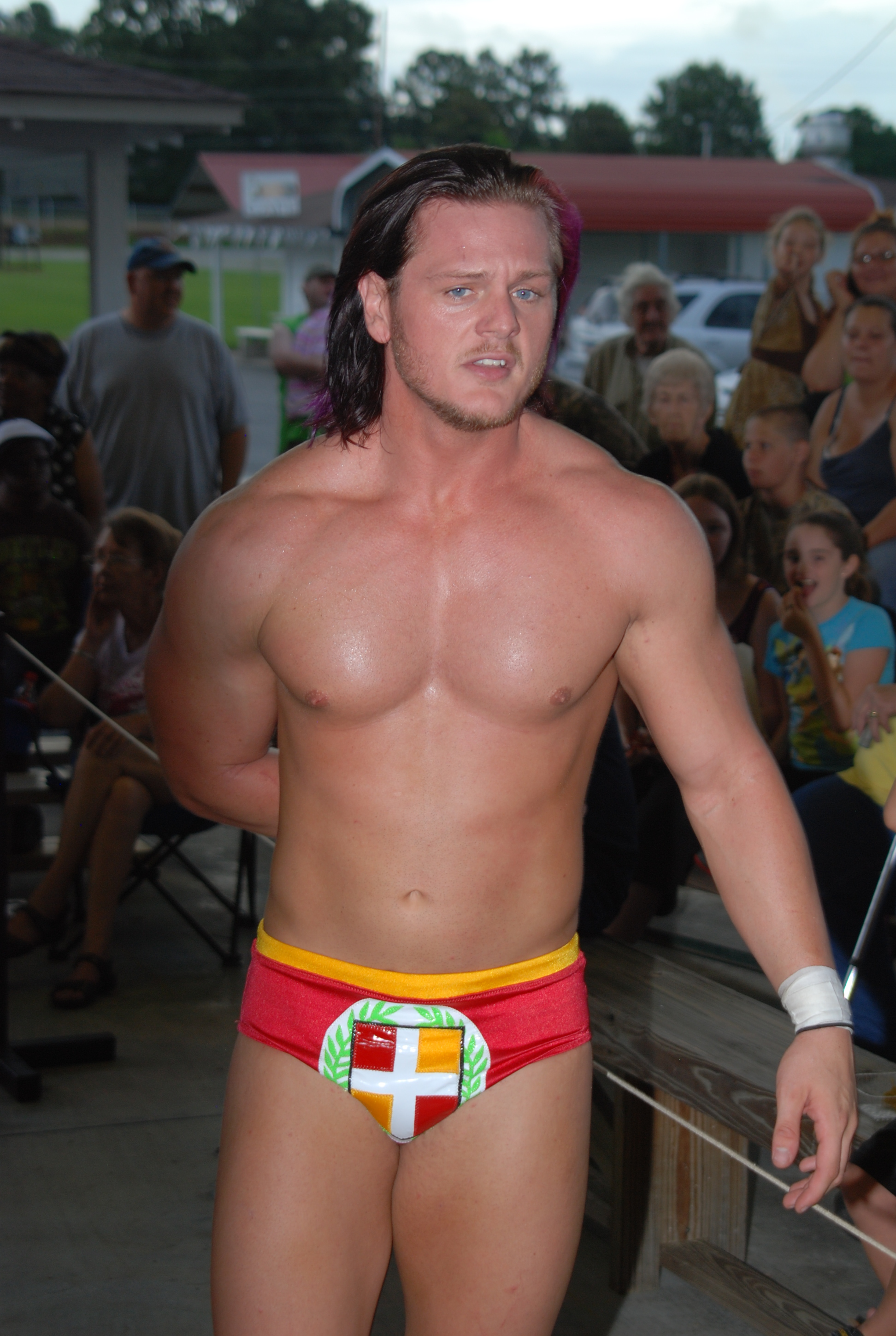 Le catcheur Caleb Konley en juillet 2013.